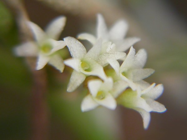 Campylocentrum ornithorrhynchum - São Paulo